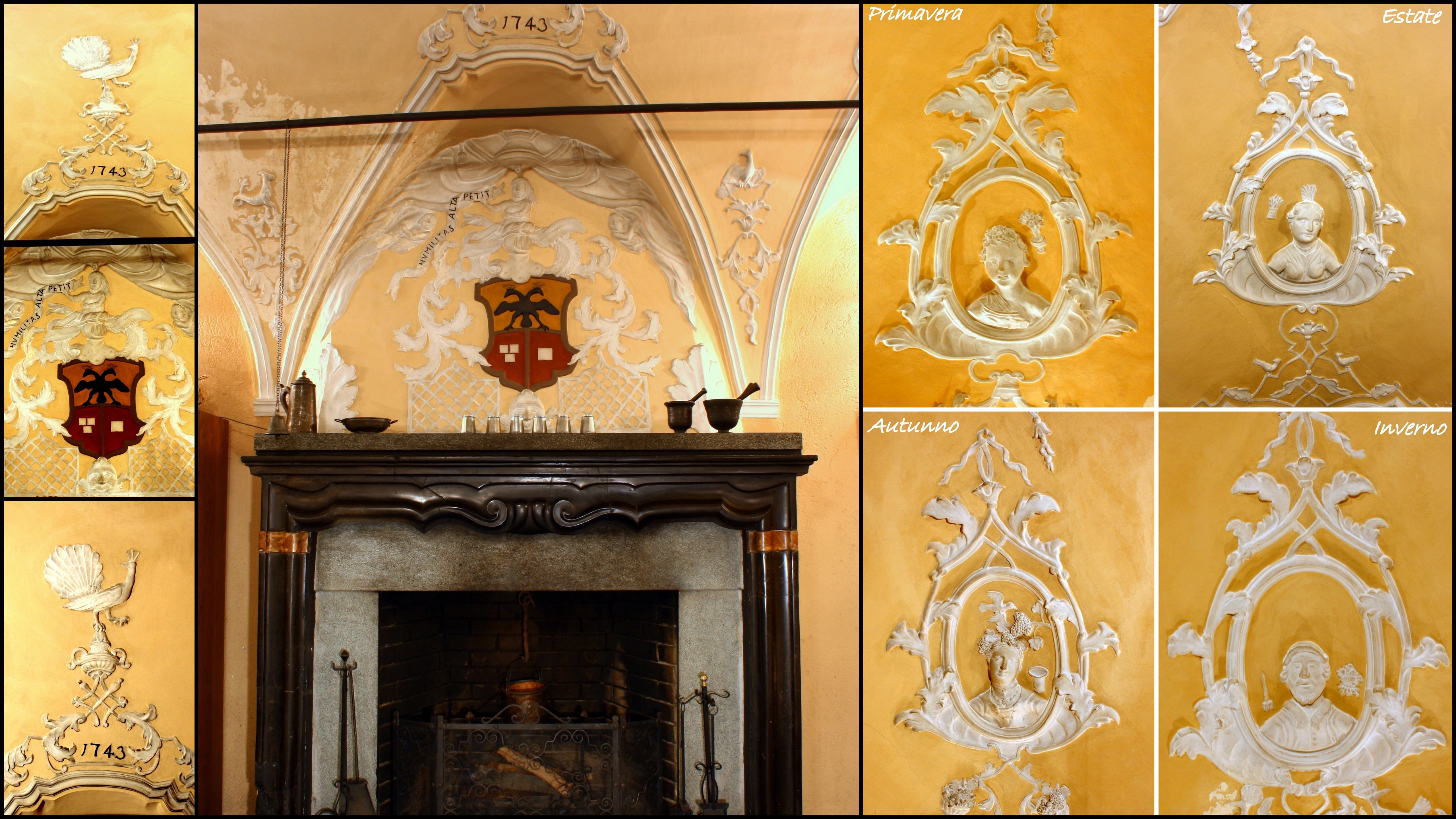 Particolari all'interno del Salone di casa Quadrio.